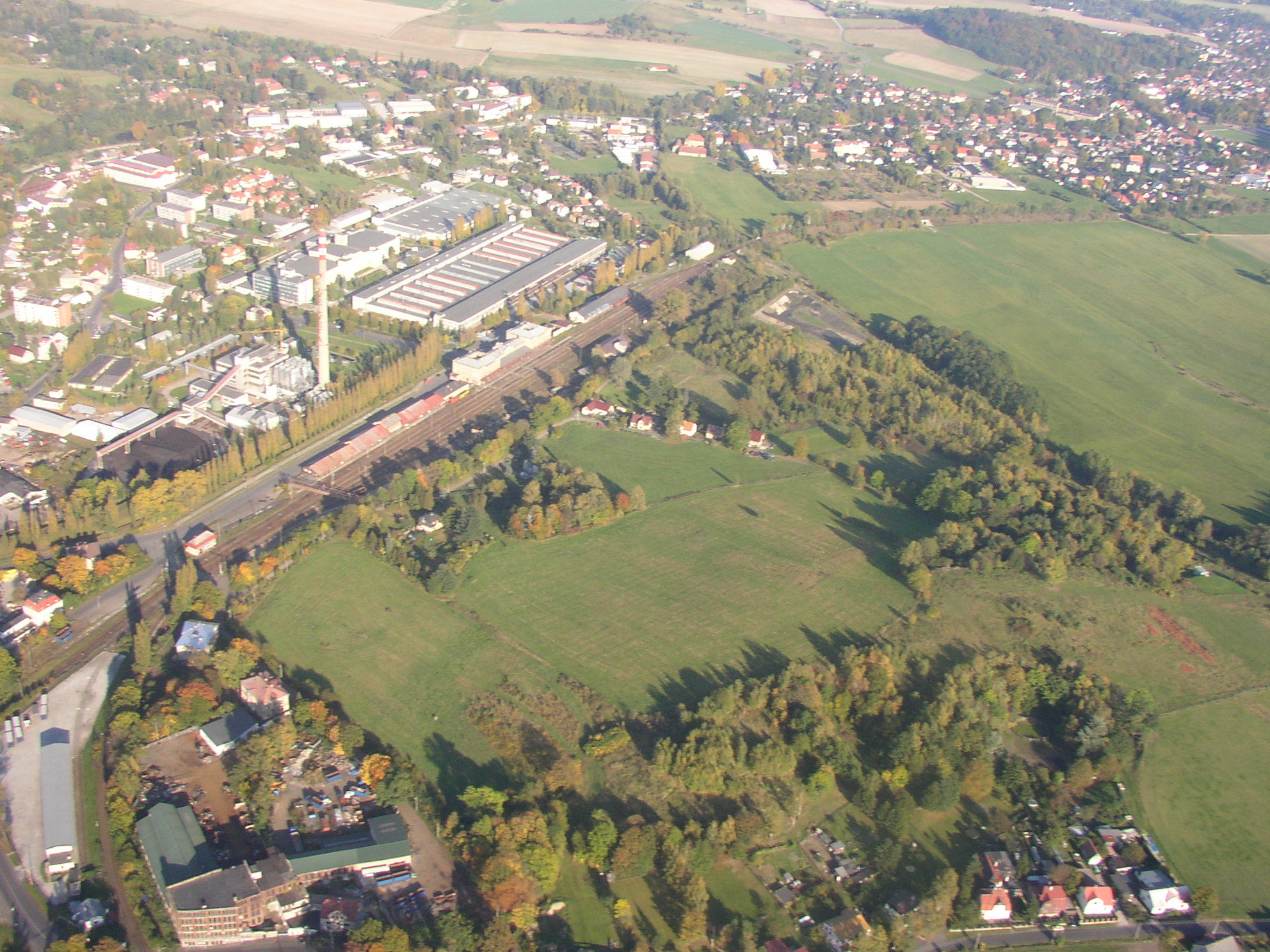 Šibeniční vrch u Varnsdorfu, Šluknovská pahorkatina, Czech Republic